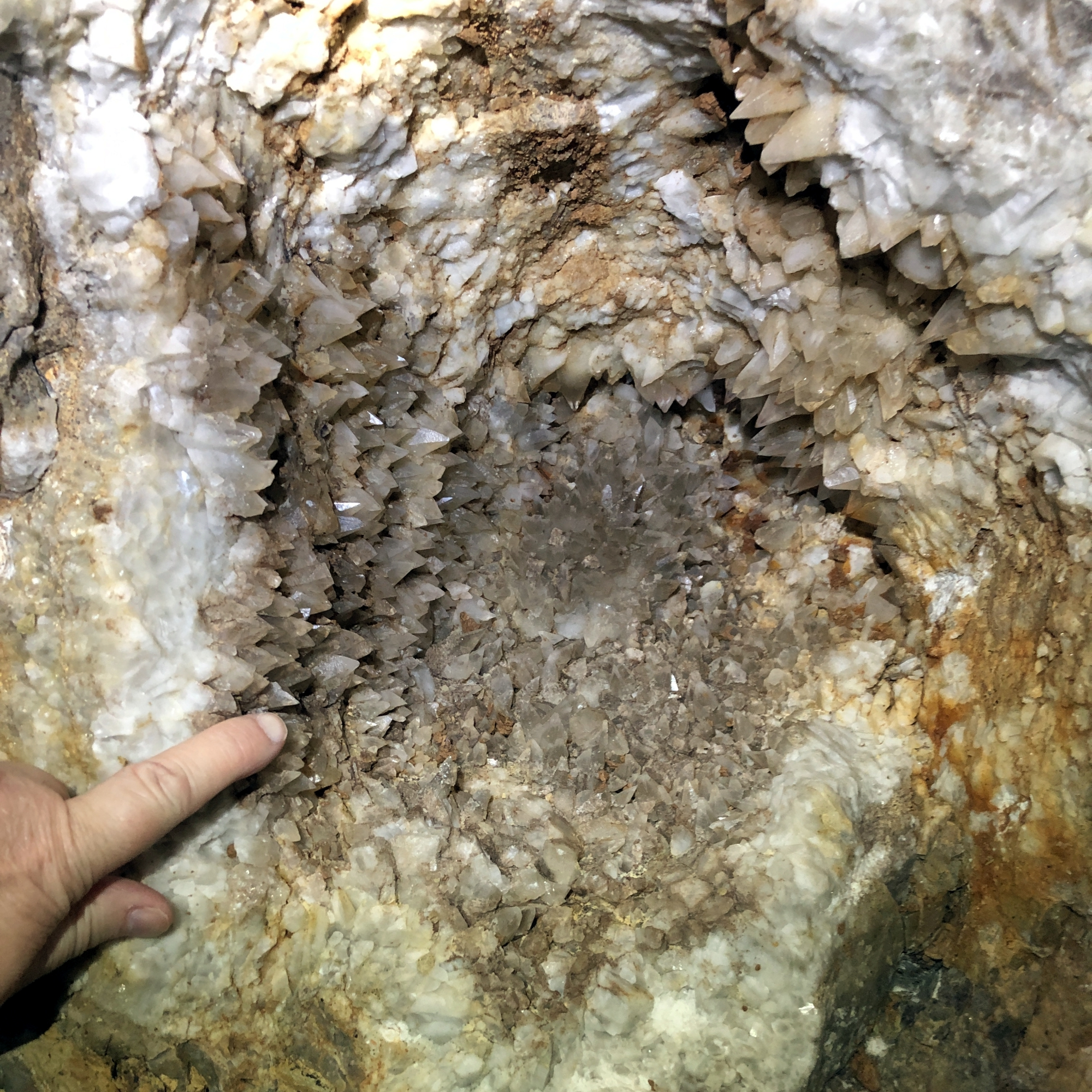 Жеода с кристаллами кальцита в шахте по добыче галенита.